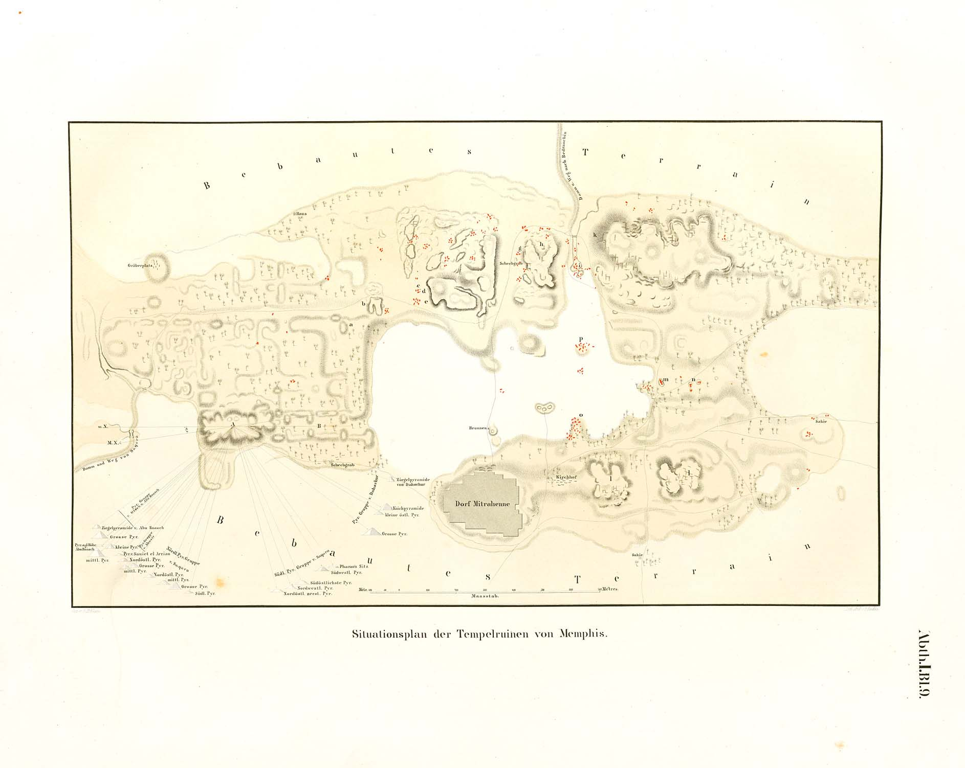 Denkmaeler aus Aegypten und Aethiopien nach den Zeichnungen der von Seiner Majestät dem Koenige von Preussen, Friedrich Wilhelm IV., nach diesen Ländern gesendeten, und in den Jahren 1842–1845 ausgeführten wissenschaftlichen Expedition auf Befehl Seiner Majestät